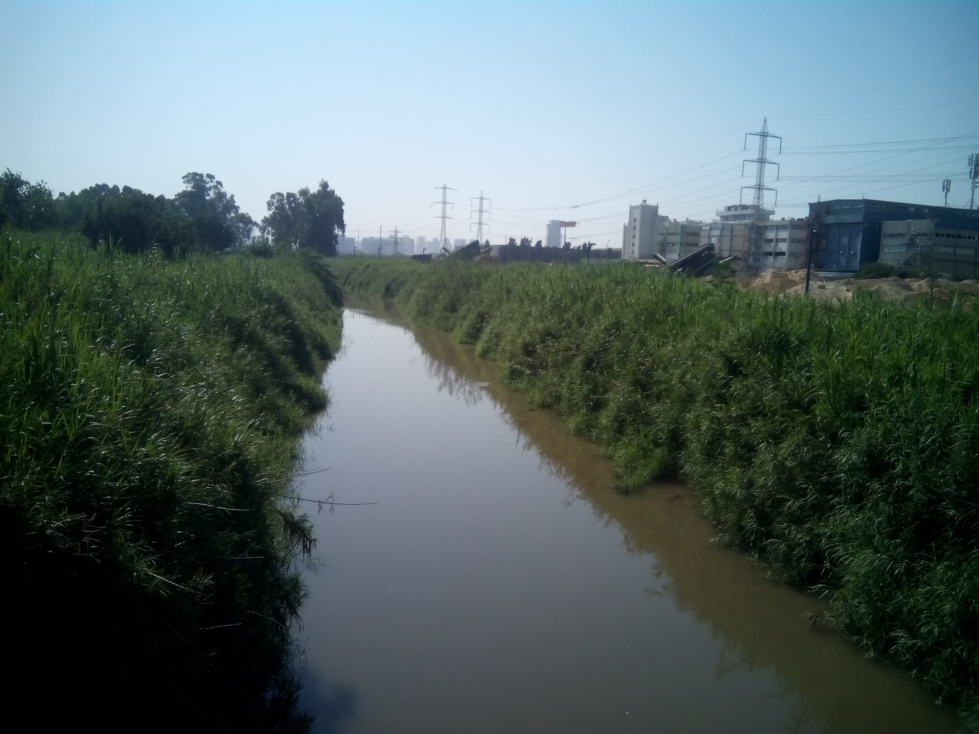 Фото с недействующего пешеходного моста в районе улицы Ха-Барзель в западном направлении.